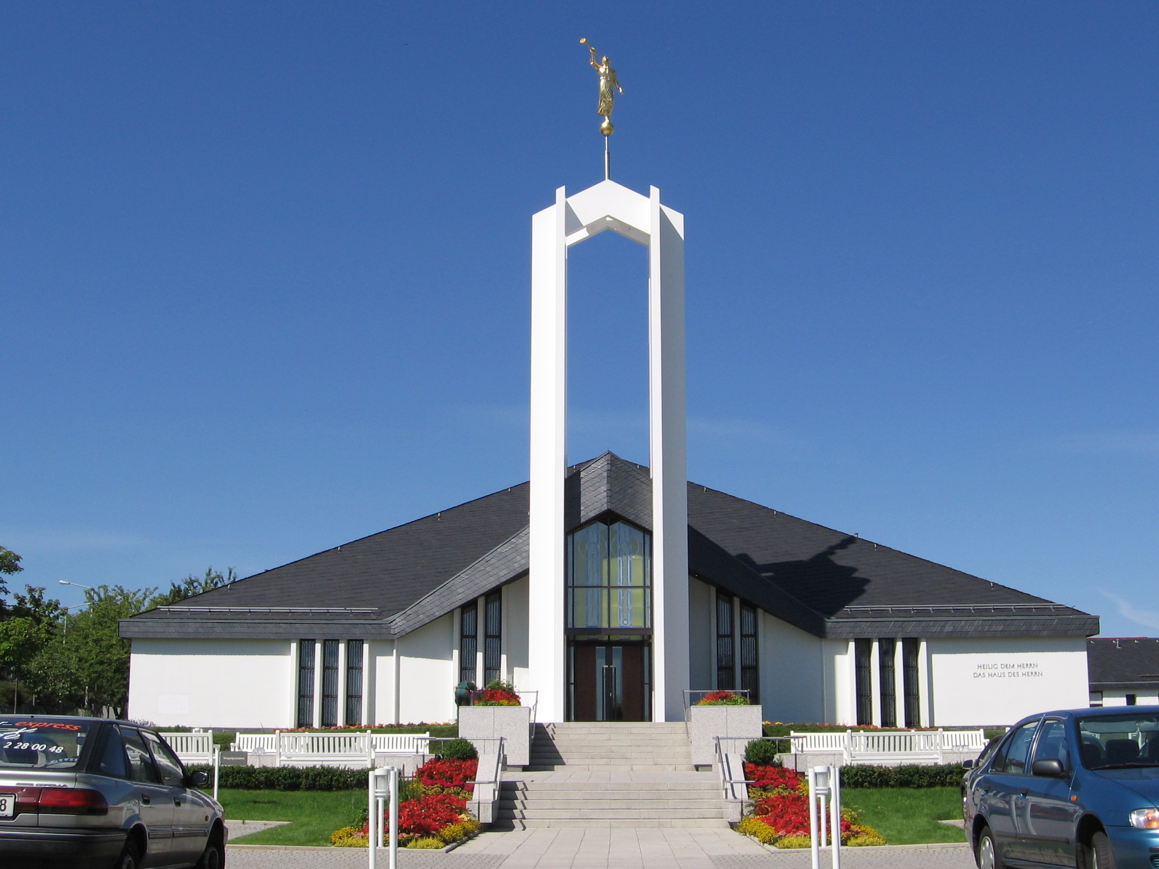 Tempel der Kirche Jesu Christi der Heiligen der Letzten Tage in Freiberg, Sachsen, Deutschland, aufgenommen von Donny Wöllauer, 18. Juli 2006